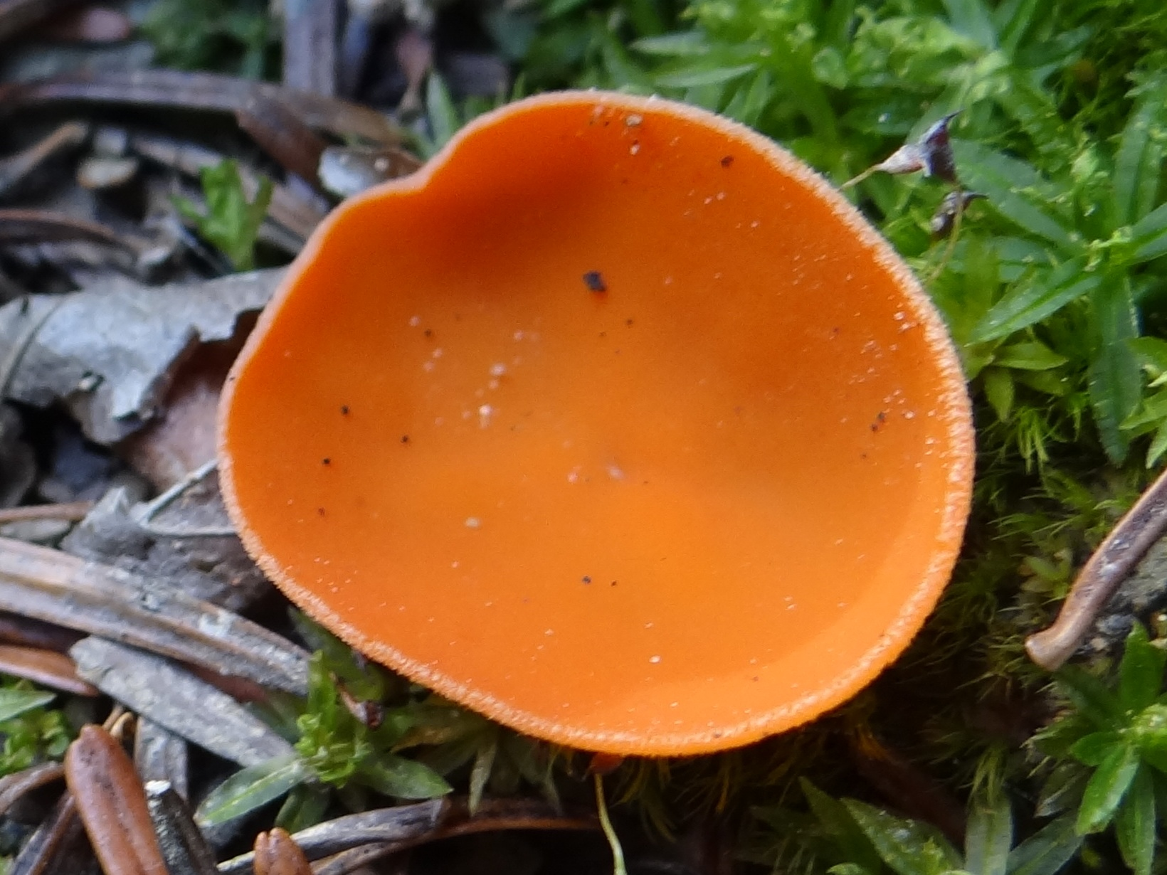 Aleuria aurantia (location:Poland, Beskid Wyspowy, Łopień)